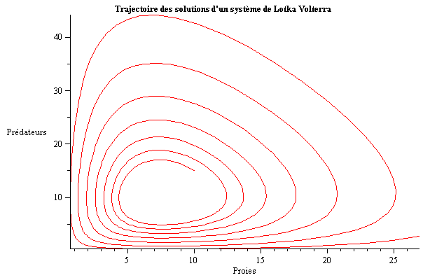 Trajectoire des solutions d'un systeme de Lotka-Voltera (Conditions initiales (10,15) ; méthode d'Euler pas=0.1)